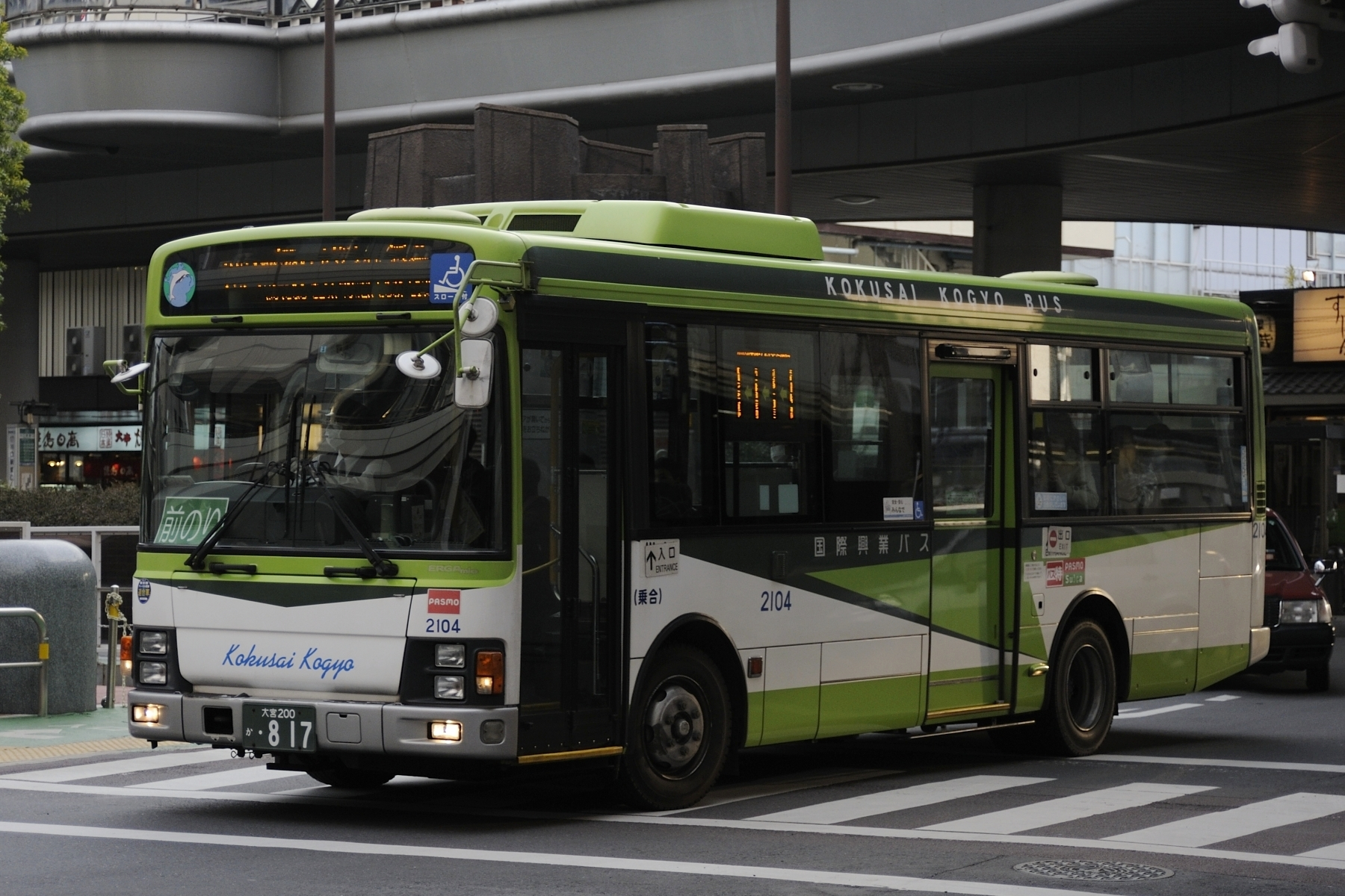 川口営業所の2104。川24充当のため出入口表記がマグネットで逆に設定され、ダッシュボードには「前のり」の表示がされている。